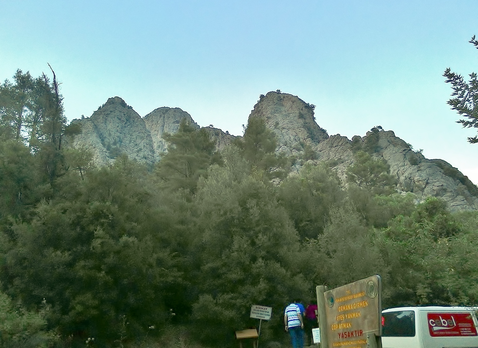 yazılı kanyaon